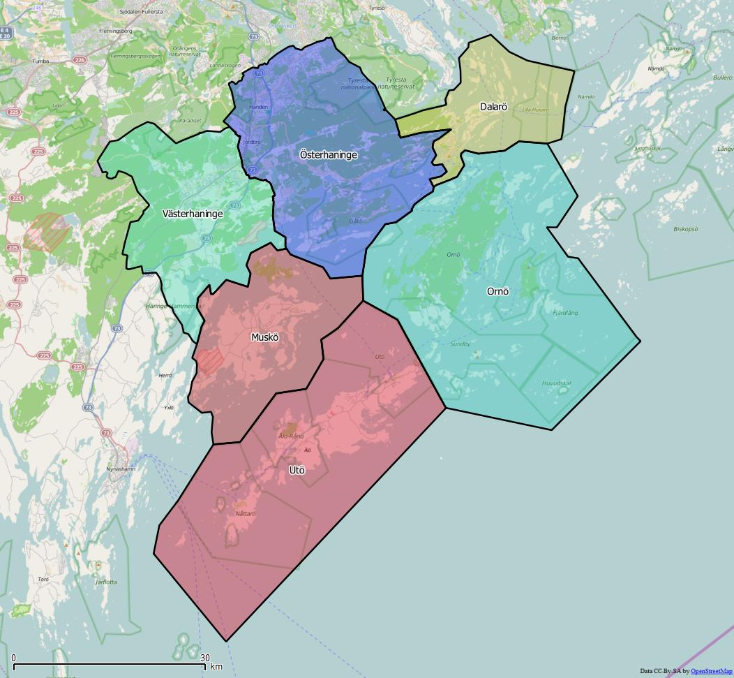 Distriktsindelningen i Haninge kommun World file 86.2660237231372804 0 0 -86.2660237231372804 1388349.290394650073722 7751988.66528221312910318